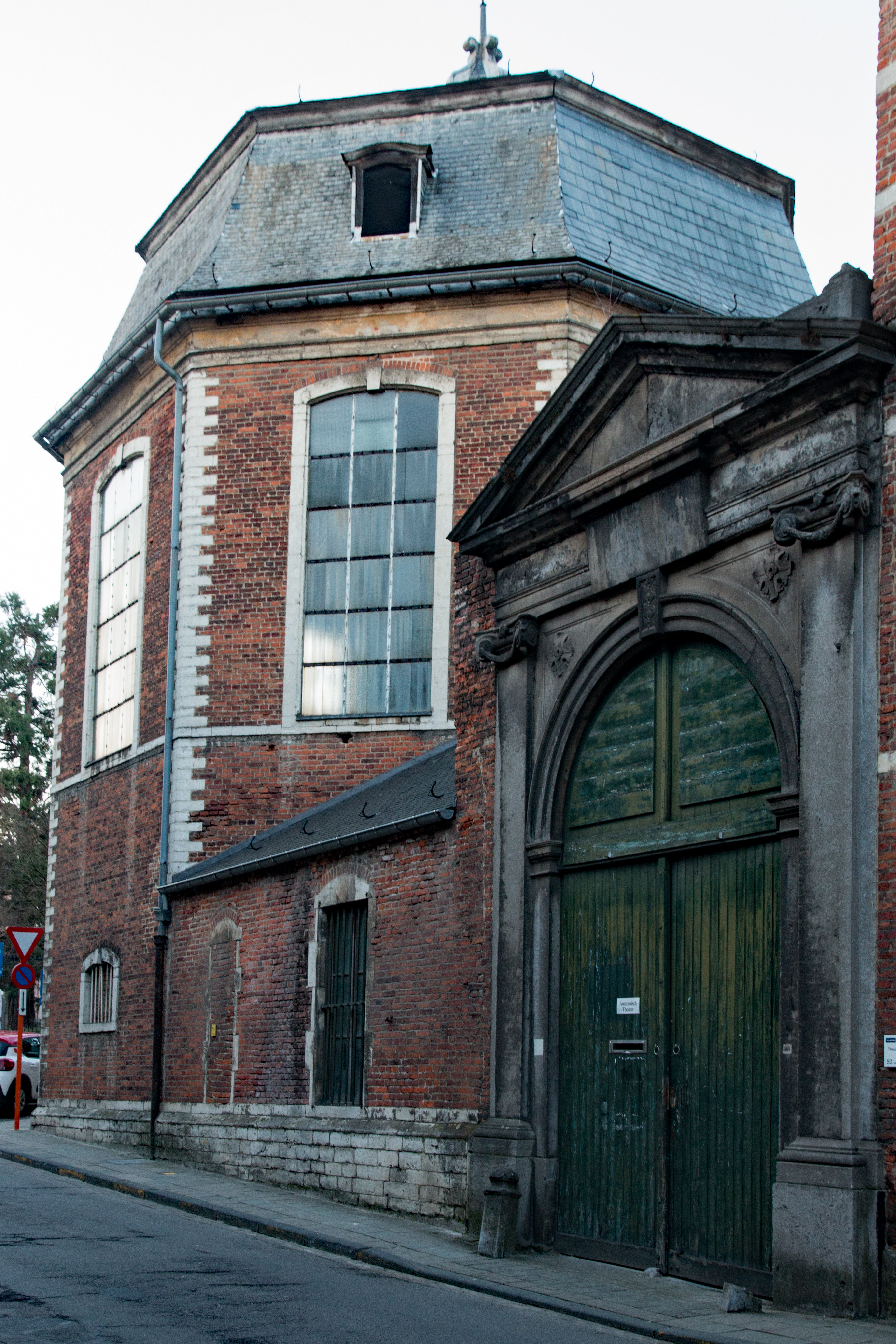 Leuven Toegangspoort tot de voormalige botanische tuin